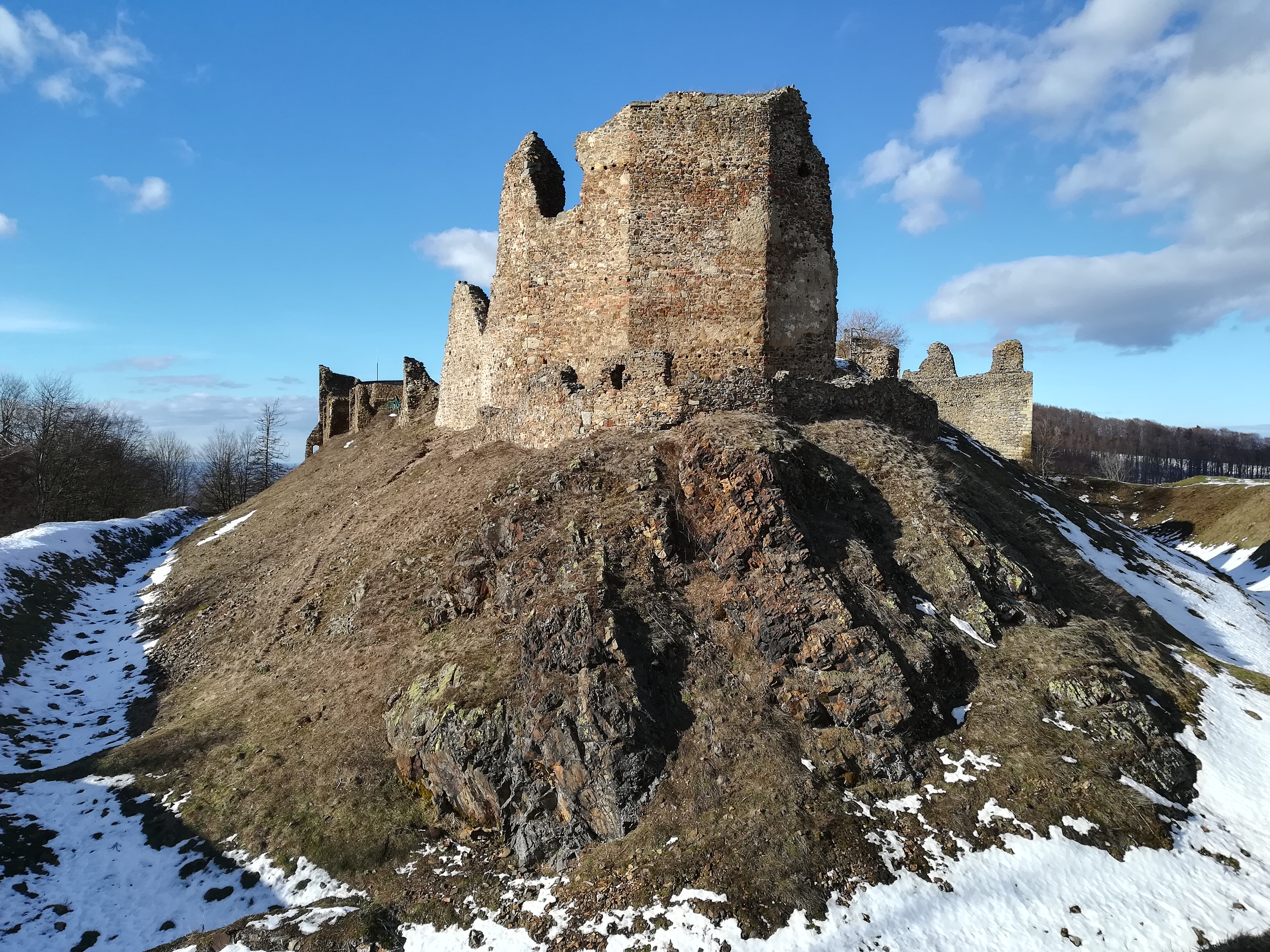 Podhradí (Třemošnice) - hrad Lichnice, pohled od JV